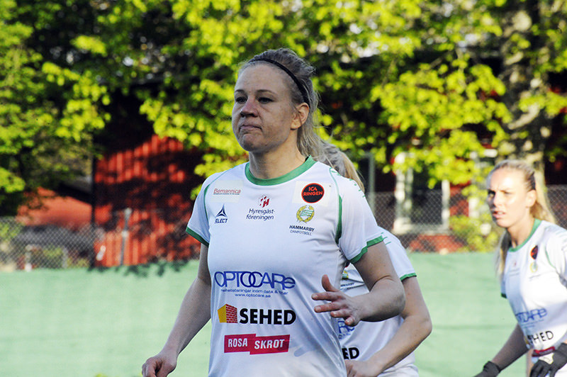 a_17_3435